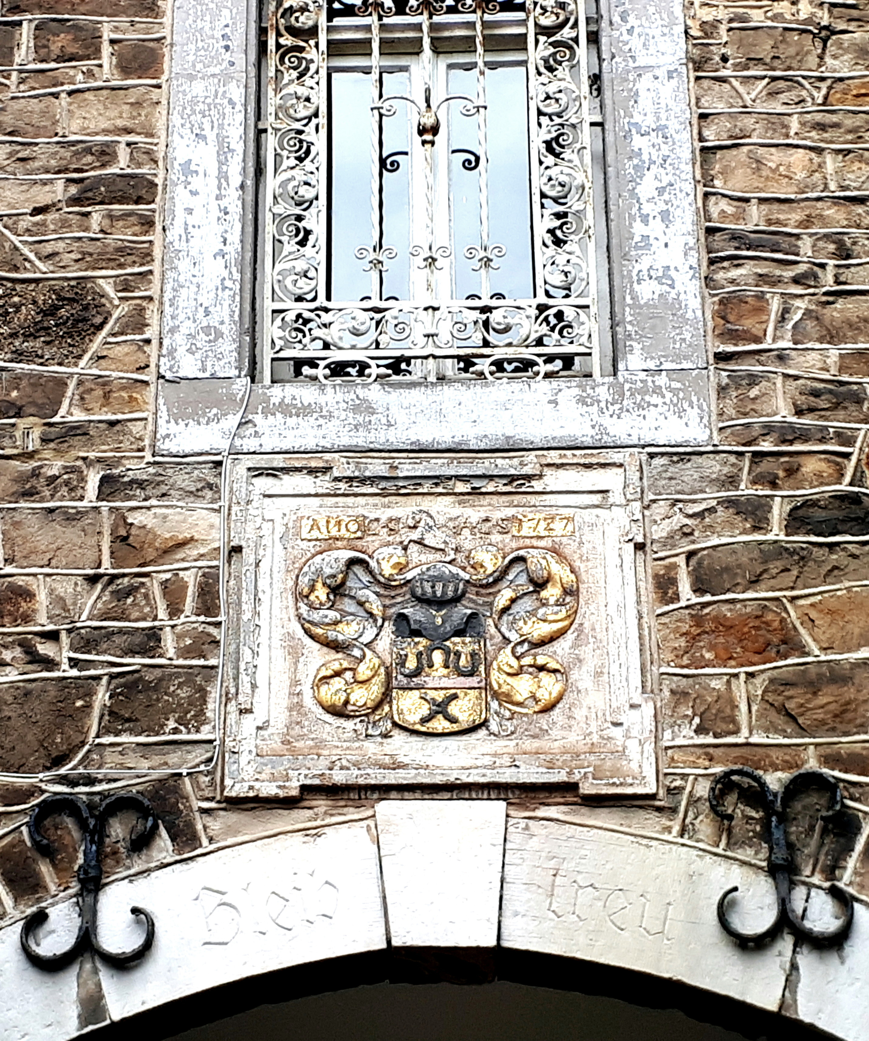 Wappen Eingangsportal Kufperhof Bleibtreu (Unterster Hof)